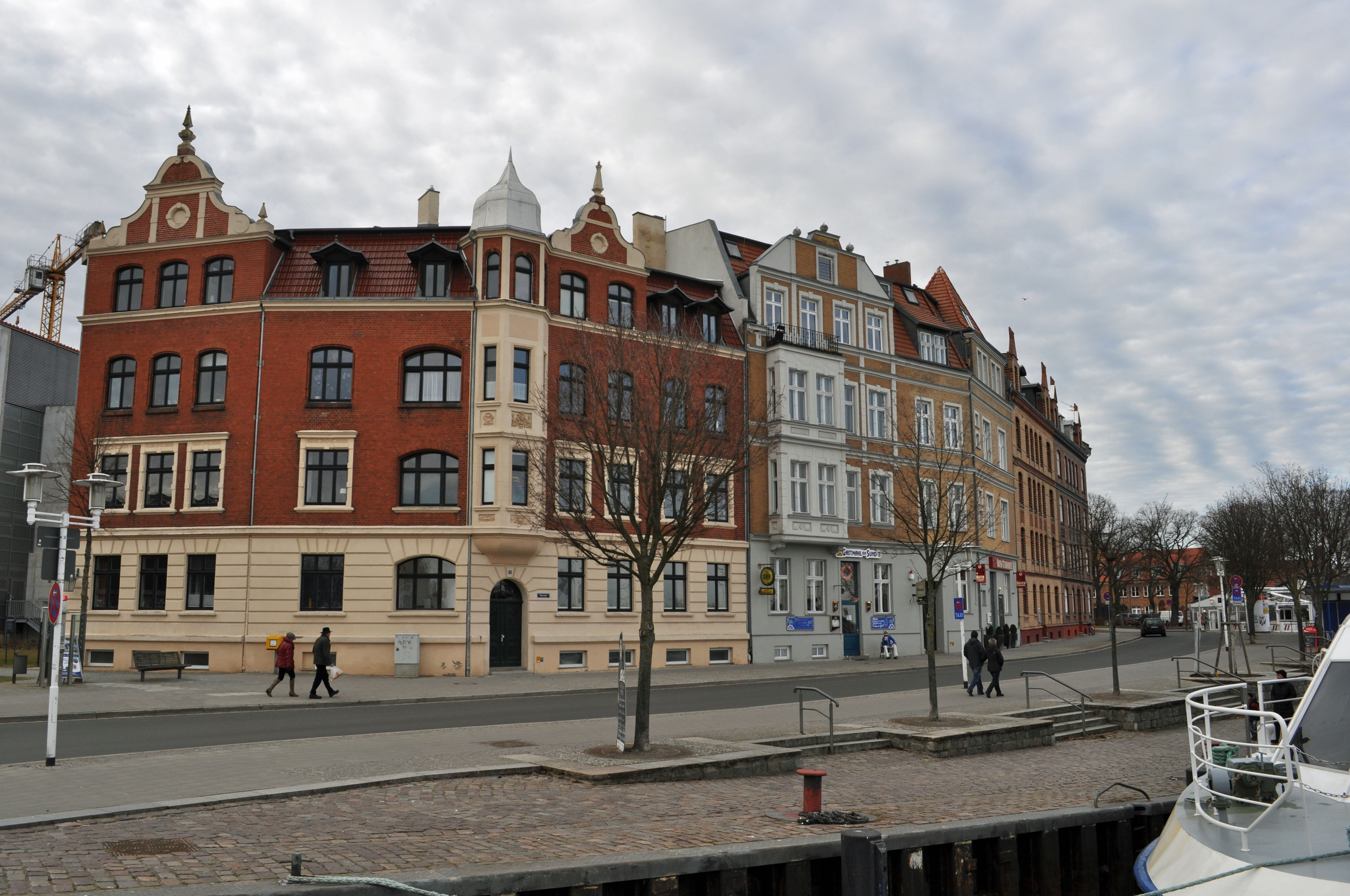 Gebäude bzw. Gebäudedetail in Stralsund. Straße und Hausnummer siehe Dateiname.